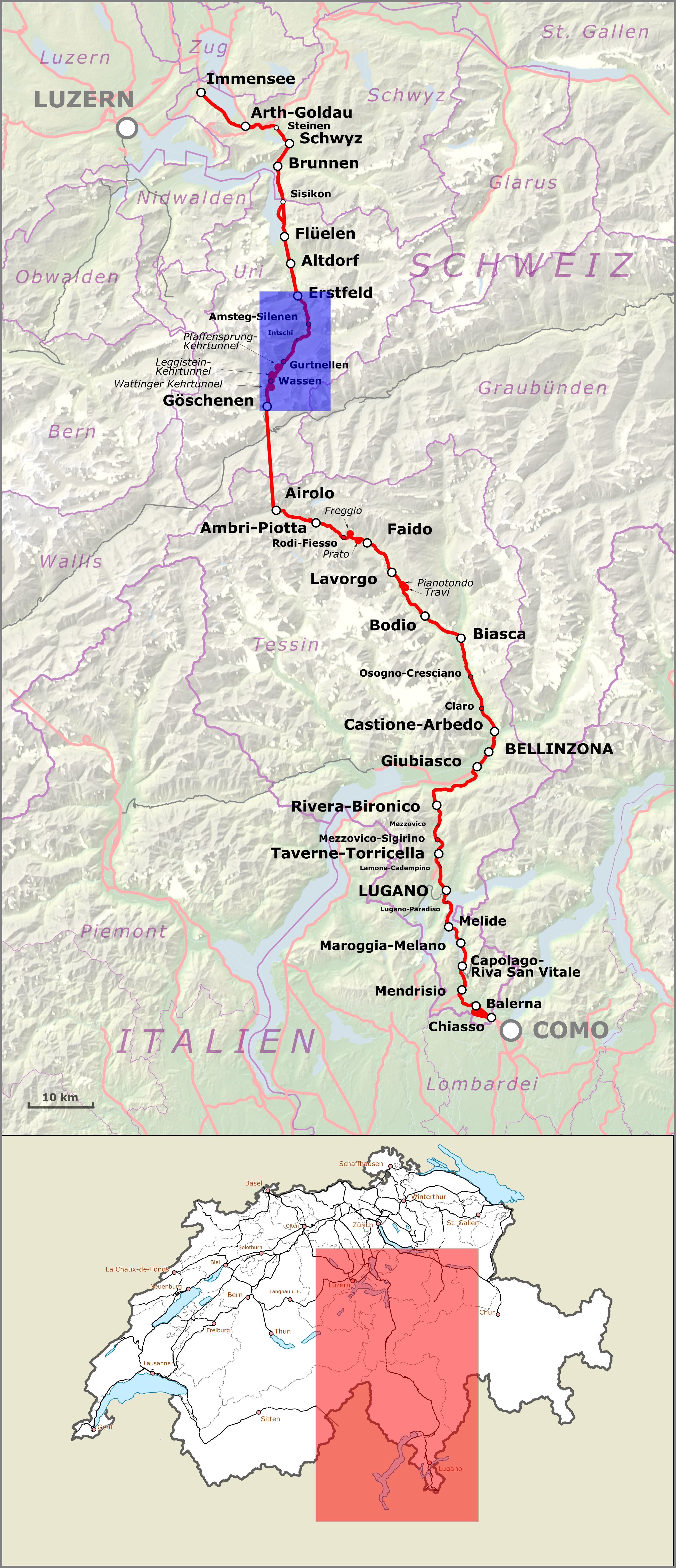 Karte der Gotthardbahn in der Schweiz. Blau hinterlegt der Bereich, der von der Modellanlage in der Ausstellung Faszination Gotthardbahn dargestellt wird